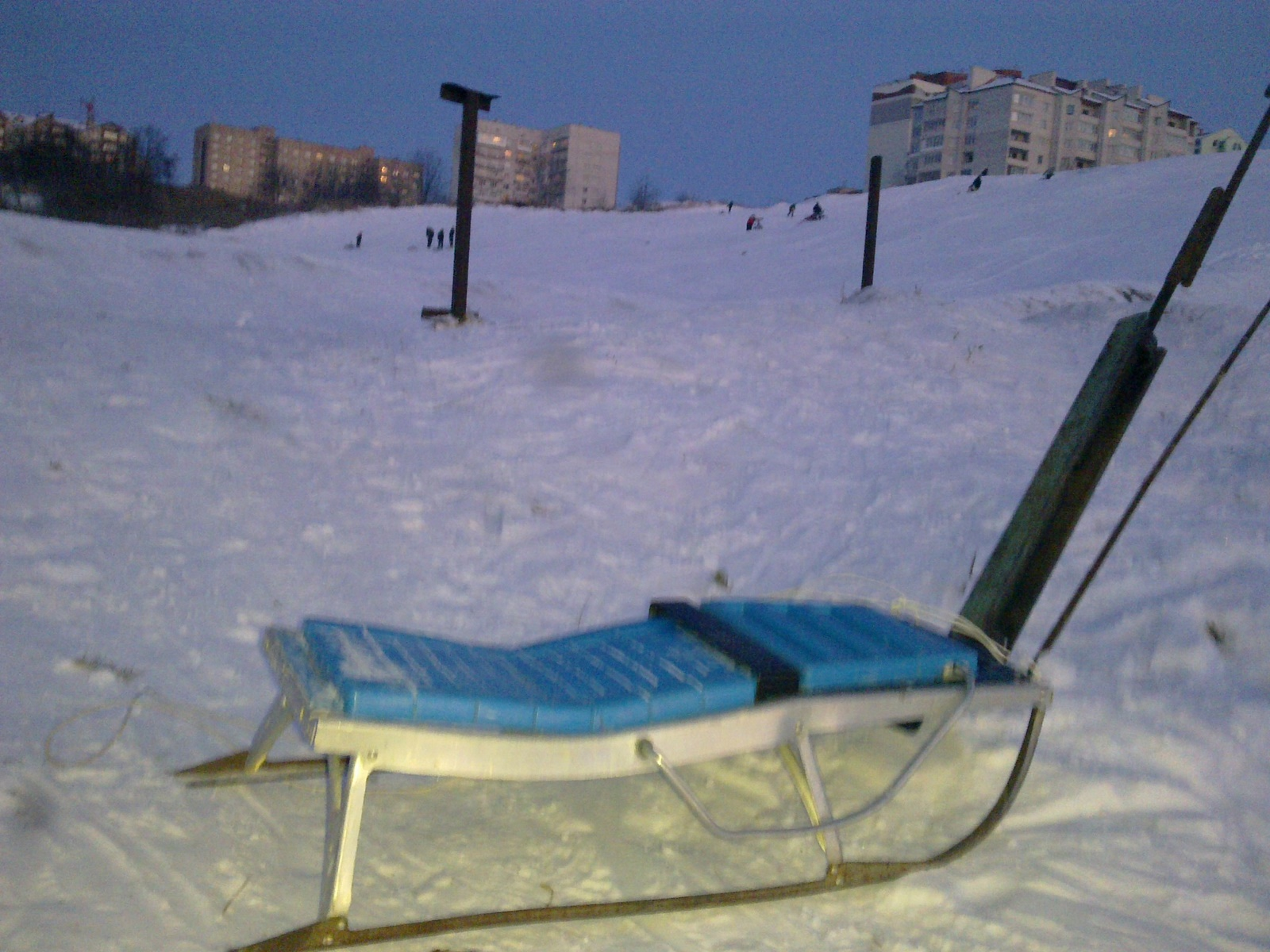 Тернопіль, вул. Тарнавського. Вигляд з "стрільбища", зимові катання